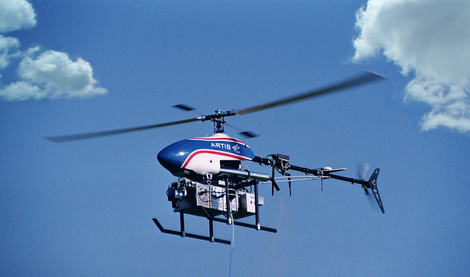 Hubschrauber midiARTIS des Instituts für Flugsystemtechnik am DLR-Standort in Braunschweig (Bild: DLR)